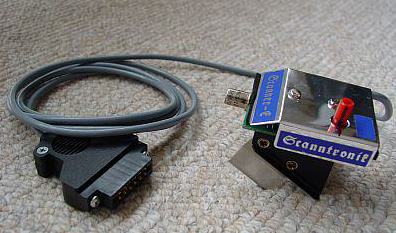 C64 Scanner von Scanntronic